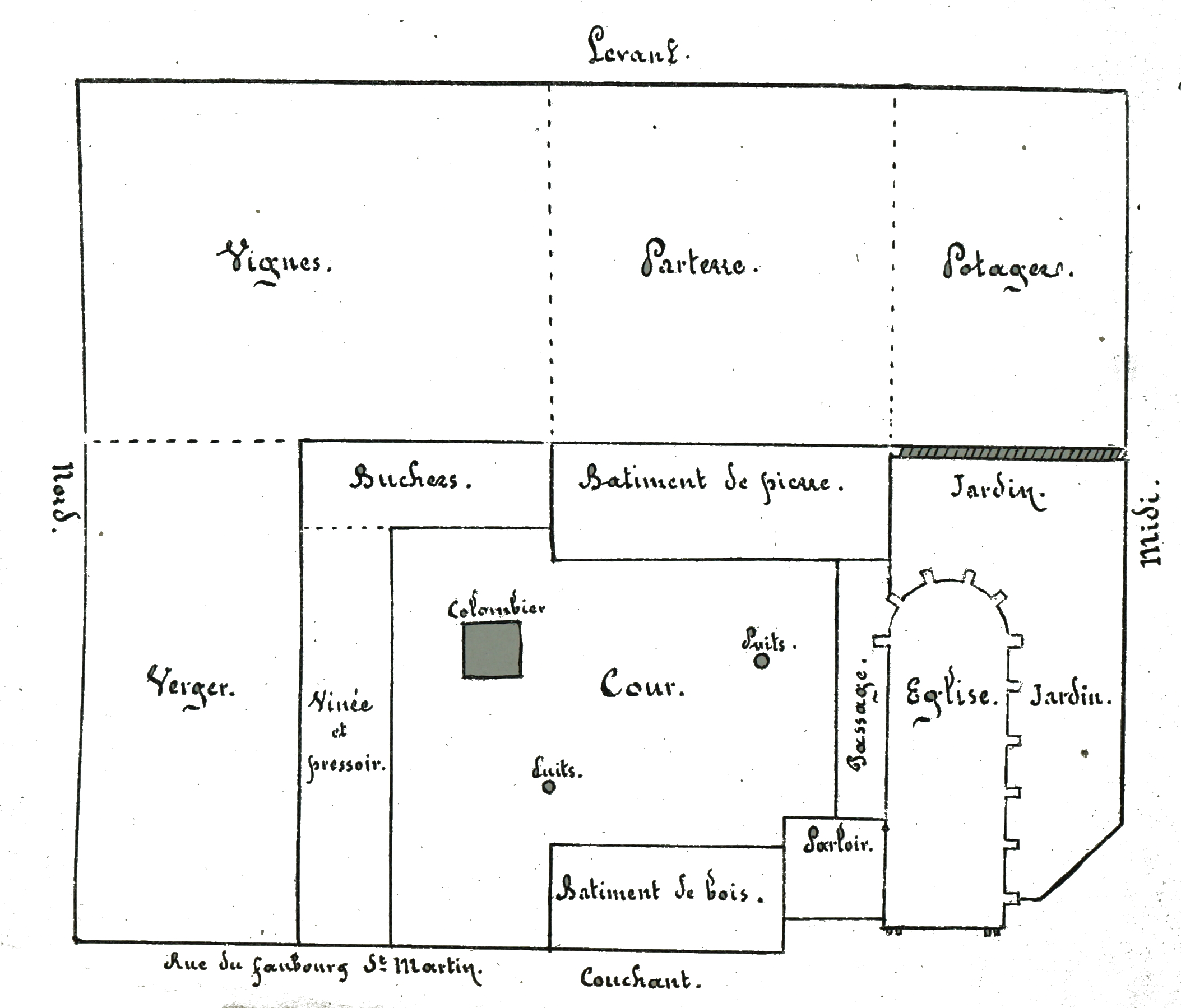 batiment des antonins de Troyes à